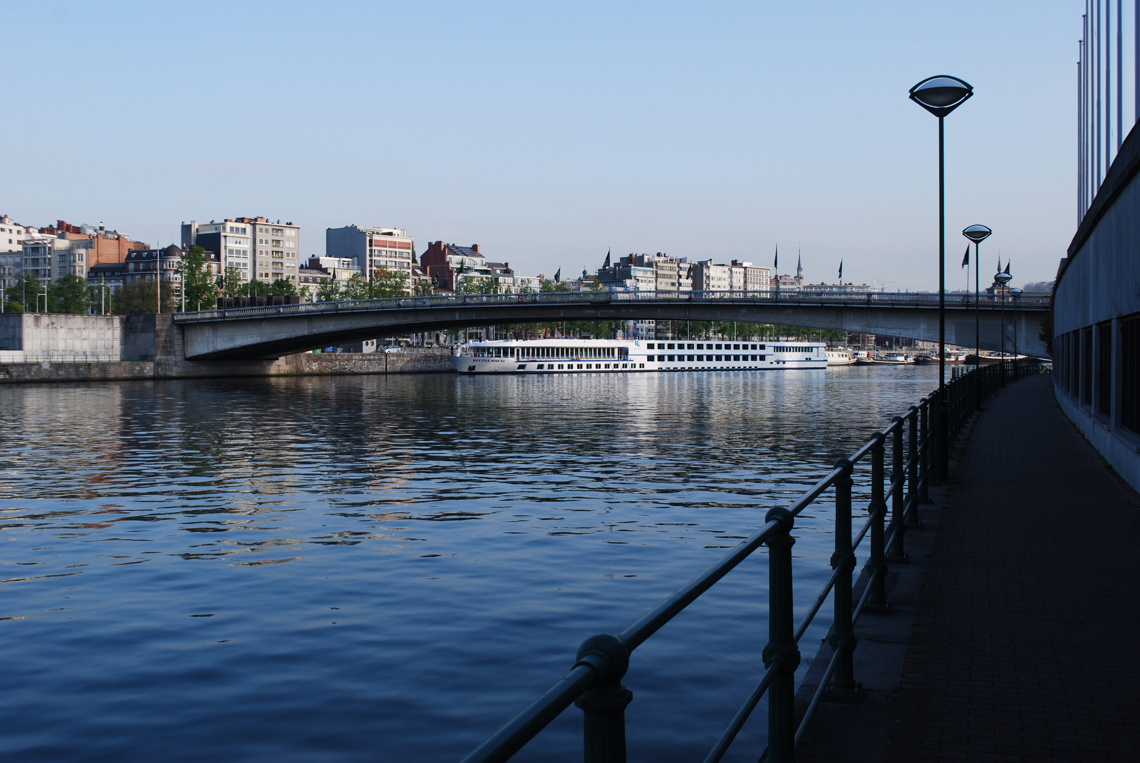 Vue du bateau de croisière "Regina Rheni" au port des yachts de Liège, sur la Meuse.